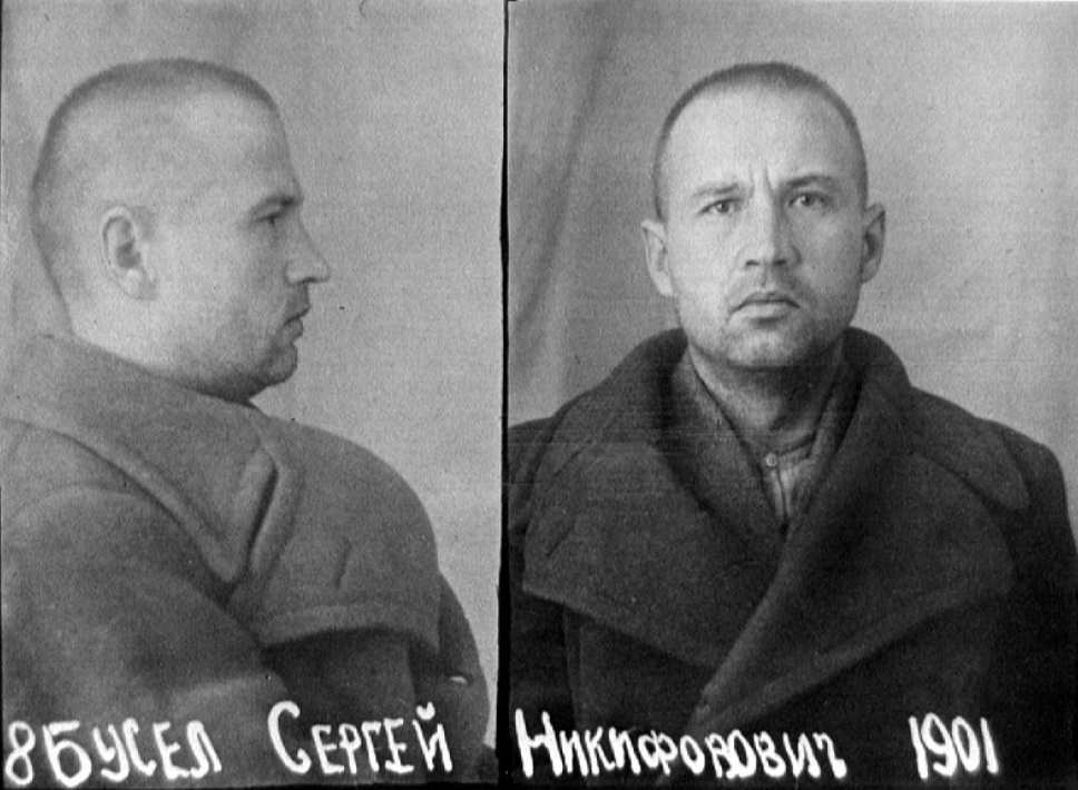 Беларуская (тарашкевіца): Сяргей Бусел, беларускі нацыянальны дзяяч. Фота са справы НКУС.